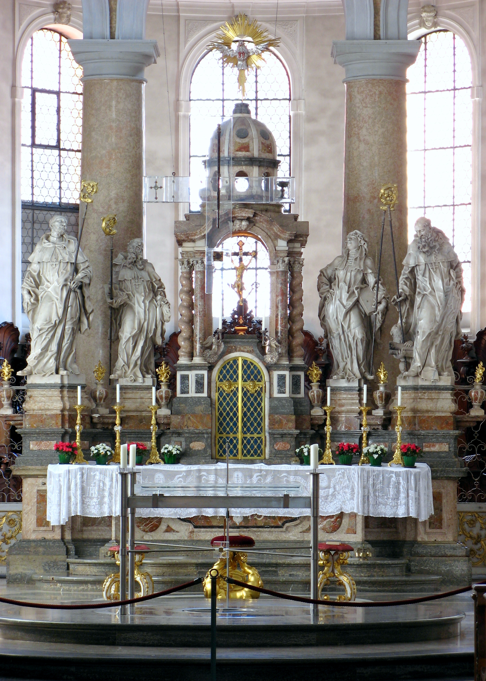 Hochaltar von Anton Sturm in der Stadtpfarrkirche St. Mang in Füssen